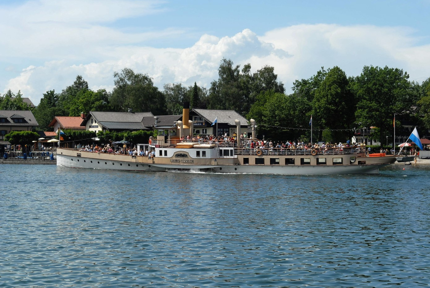 Chiemsee, Boat Ludwig Fessler